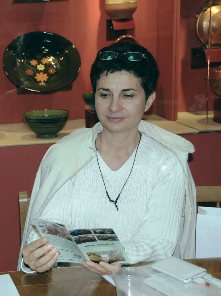 "Музей на художествените занаяти, Троян, 2012"